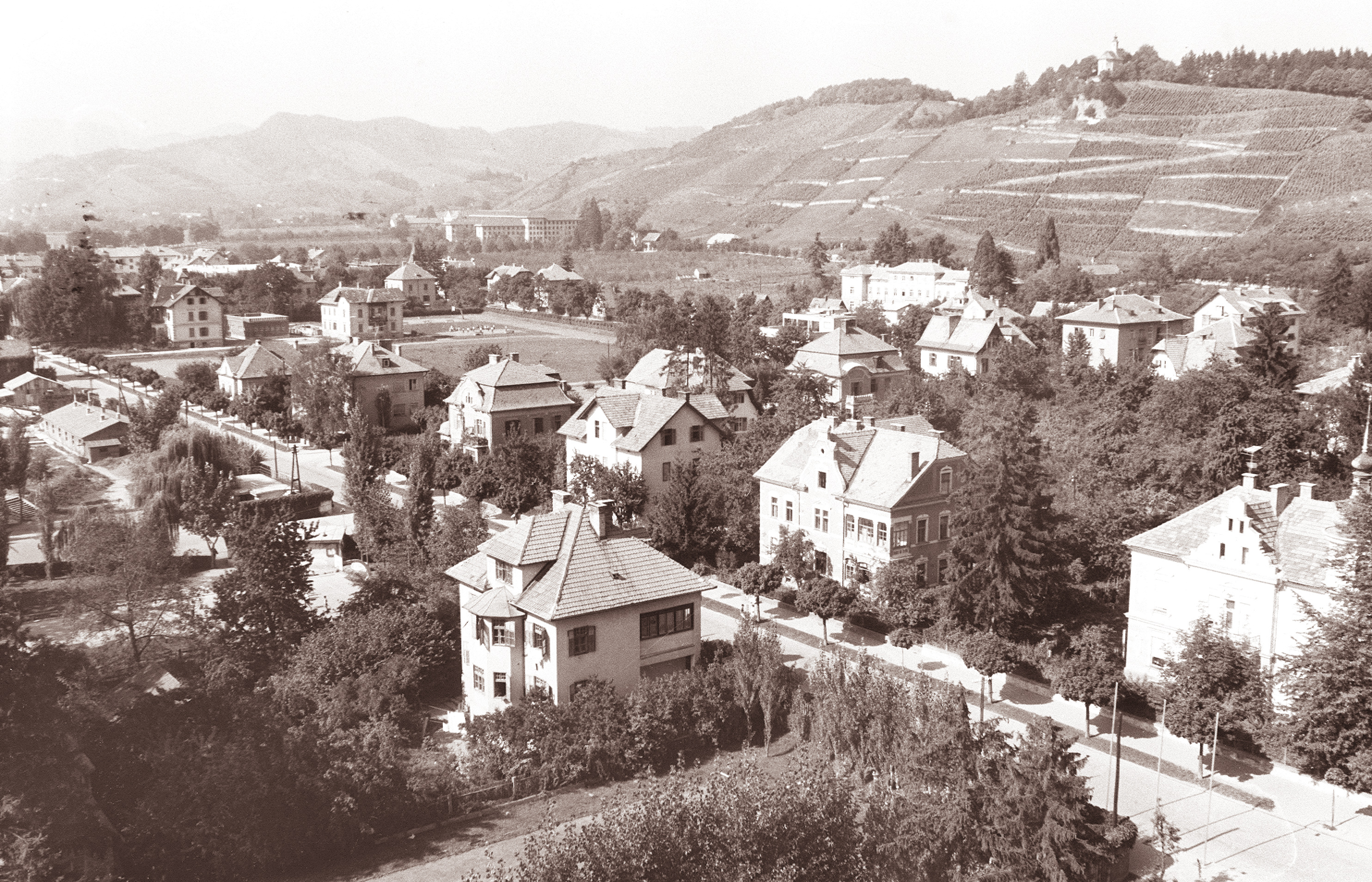 Pogled na Maribor - predel Koroška vrata - Mladinska ulica